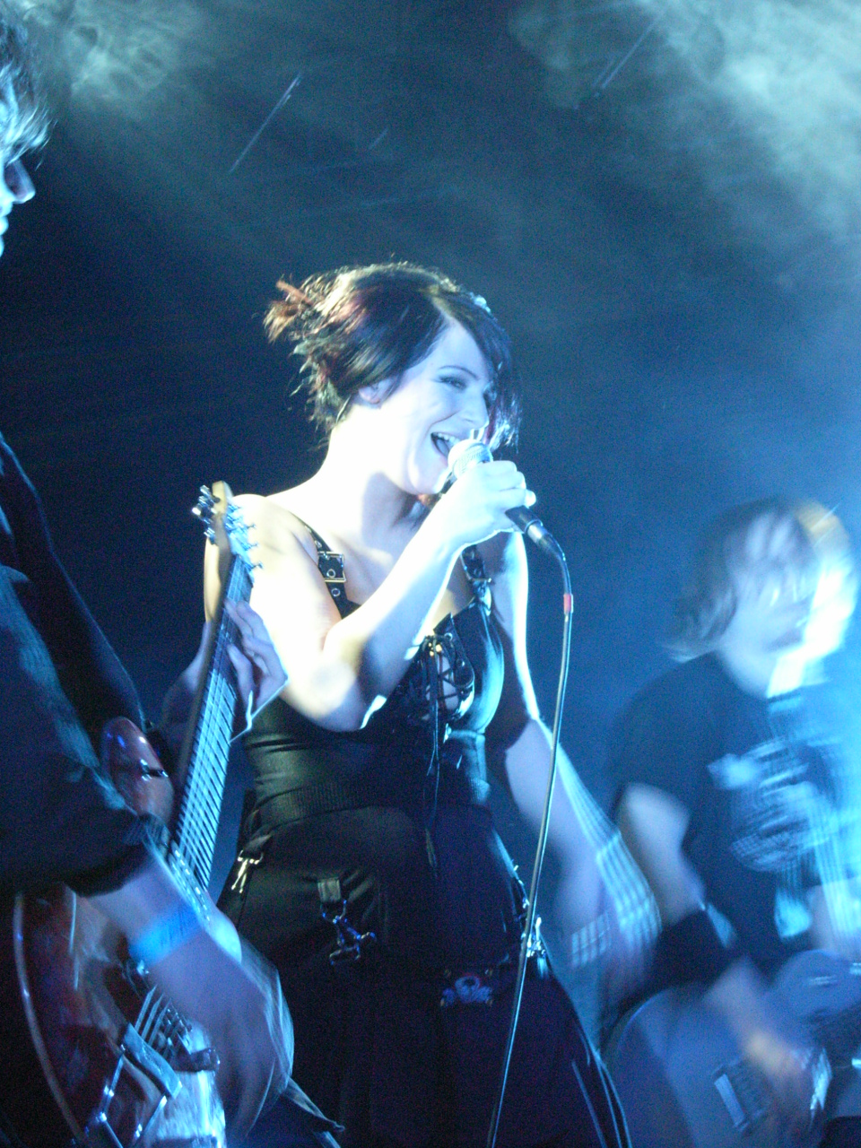 Lisa from Xandria at Unifest 2006.